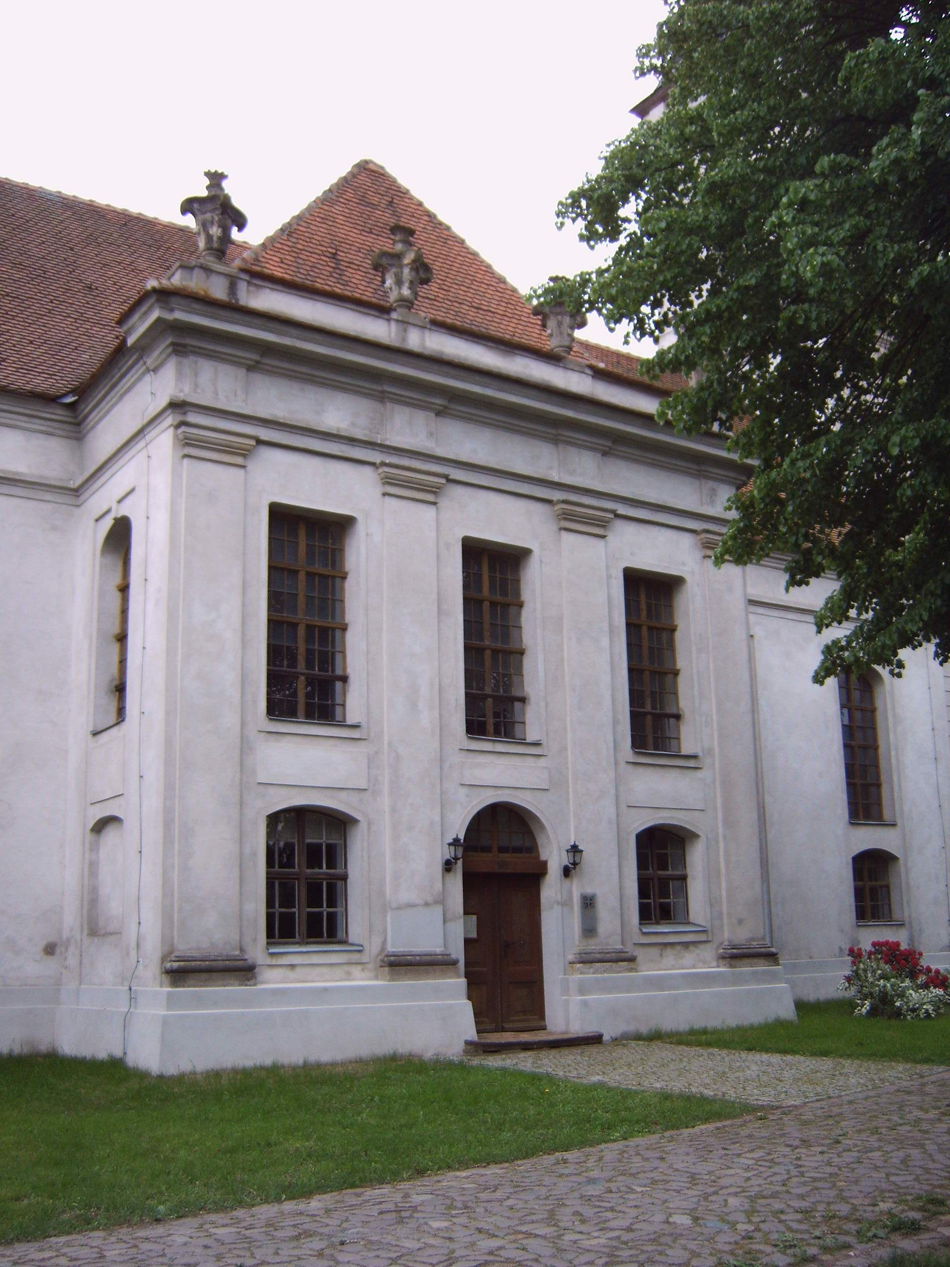 Kirche in Tucheim, nördlicher Querflügel Bild aufgenommen am 23.5.2006 von Olaf Meister